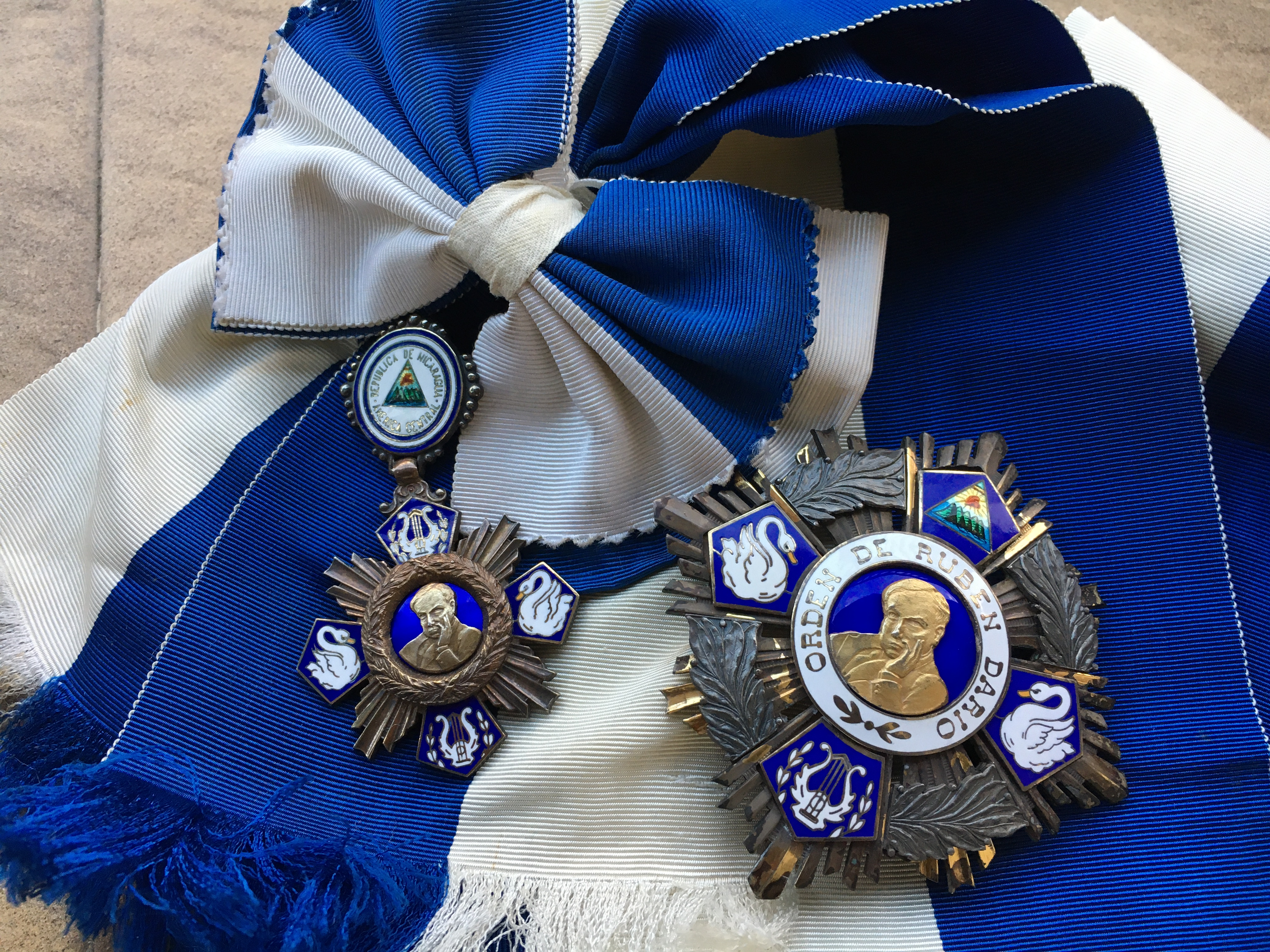 Gran Cruz de la Orden de Rubén Darío, República de Nicaragua. AEA Collections.